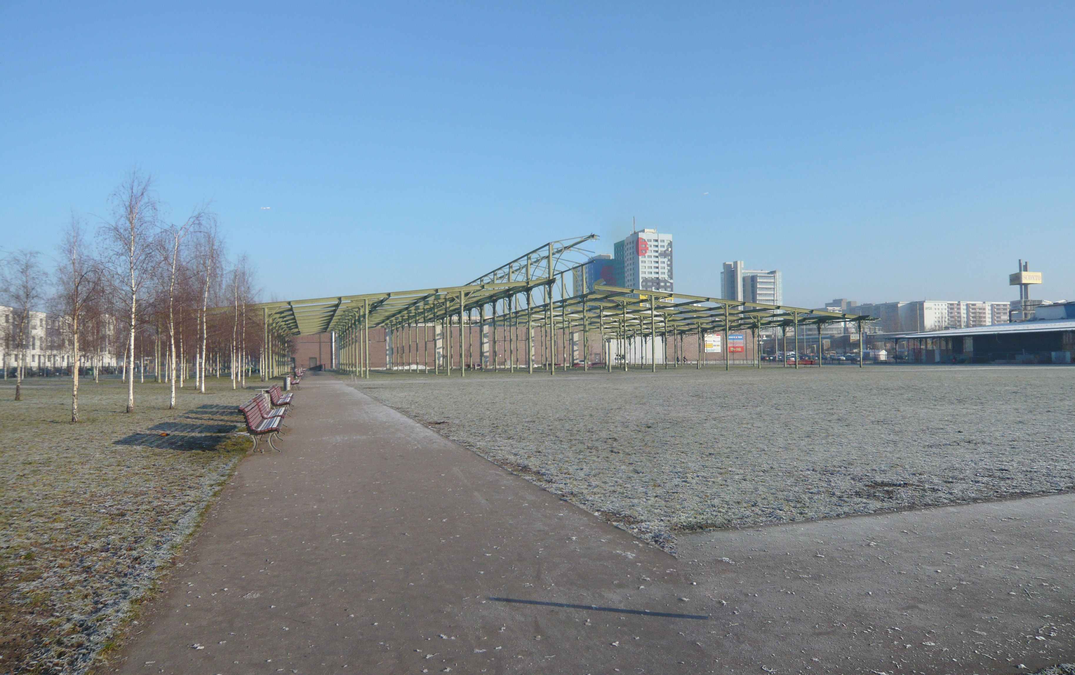 Prenzlauer Berg, Entw.gebiet Alter Schlachthof: Blankensteinpark, Nordbereich